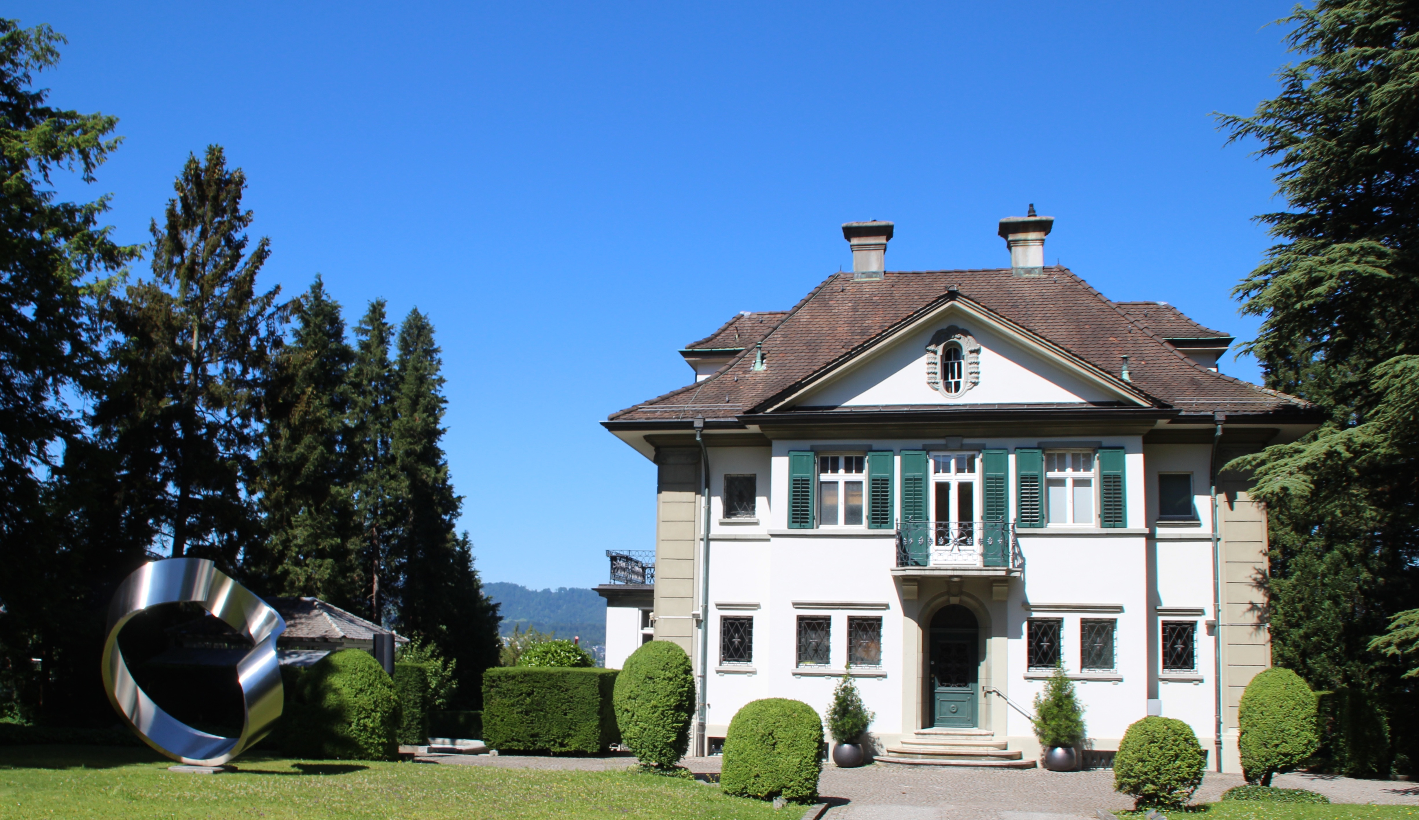 Ostfassade Villa Meier-Severini in Zollikon